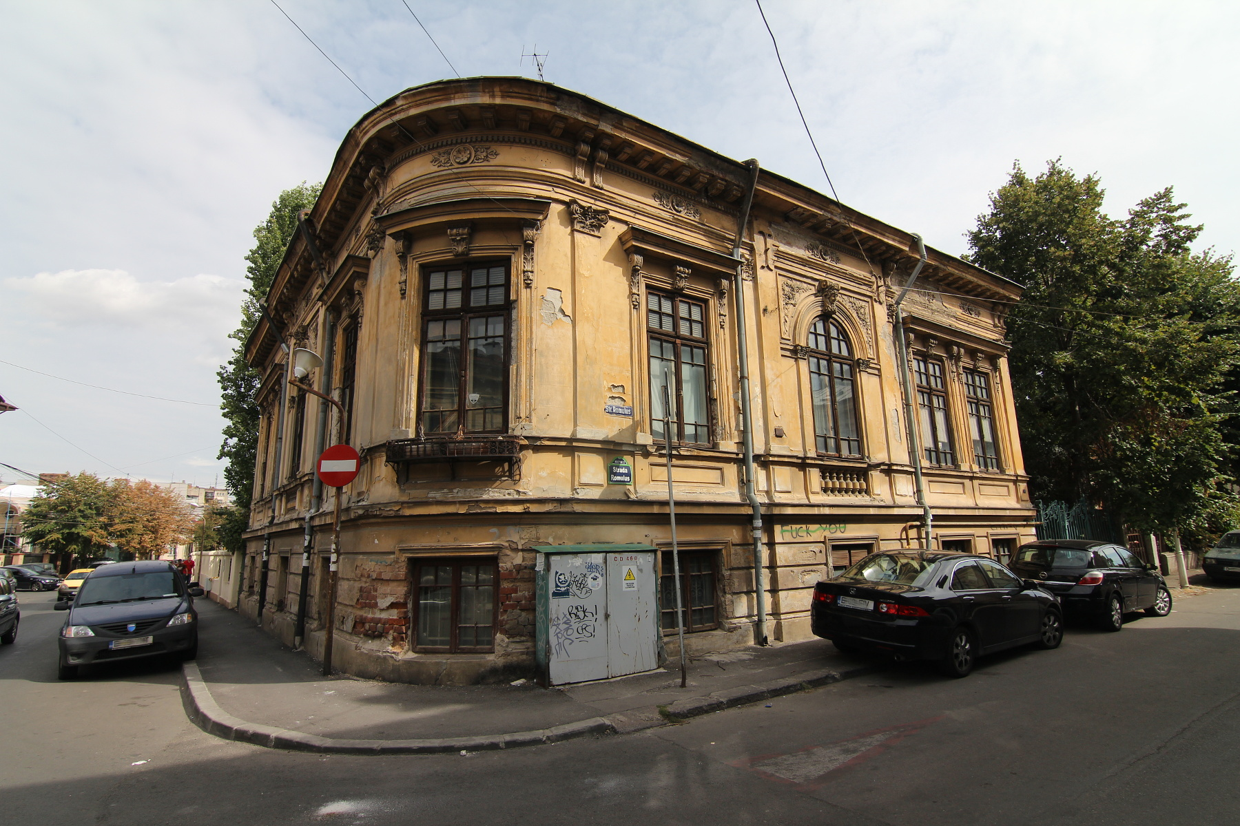 Casă pe Str Romulus